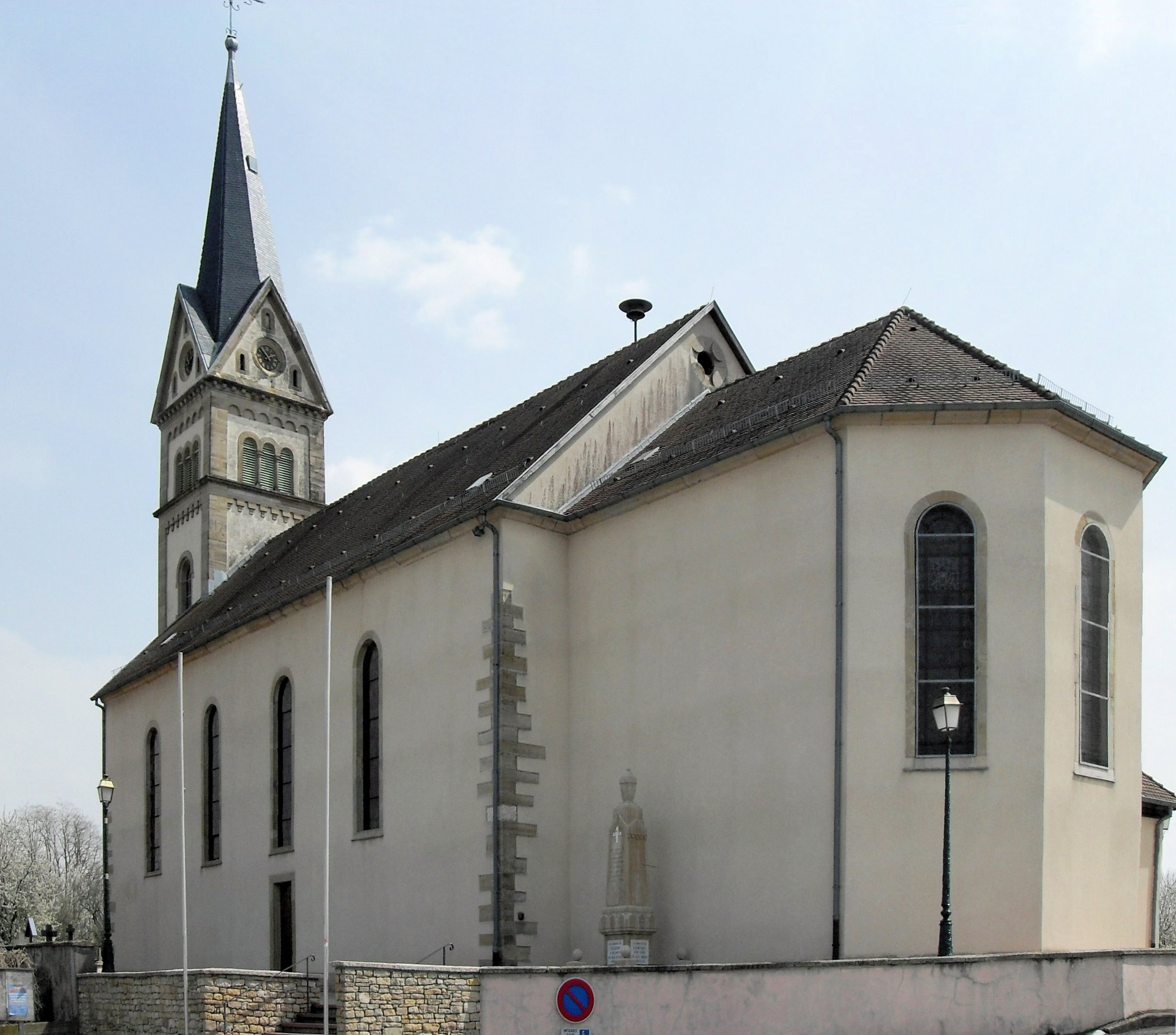 L'église Saint-Blaise à Tagsdorf